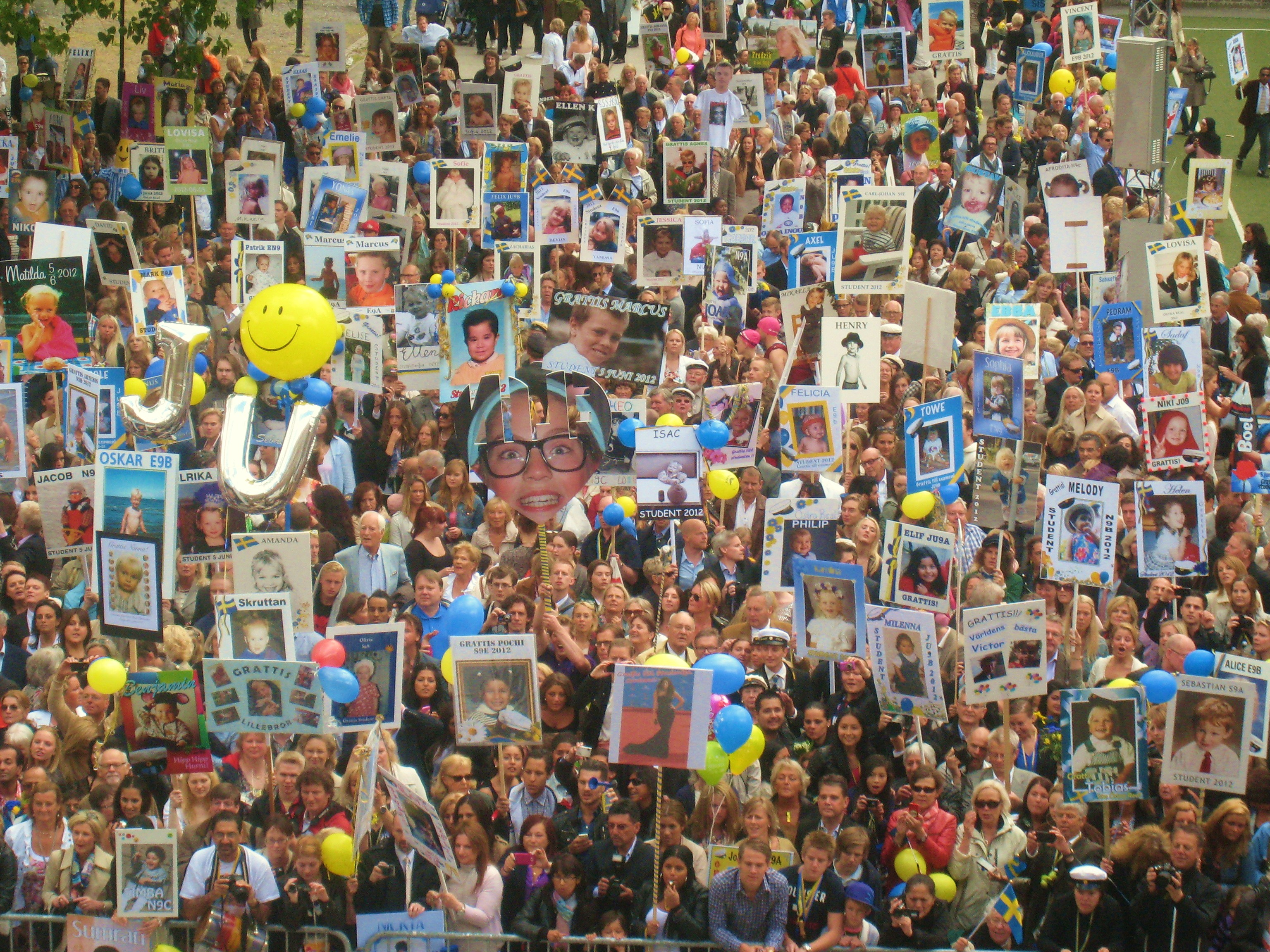 Avhämtning vid studentdagen 2012 på Östra Reals gymnasium i Stockholm.